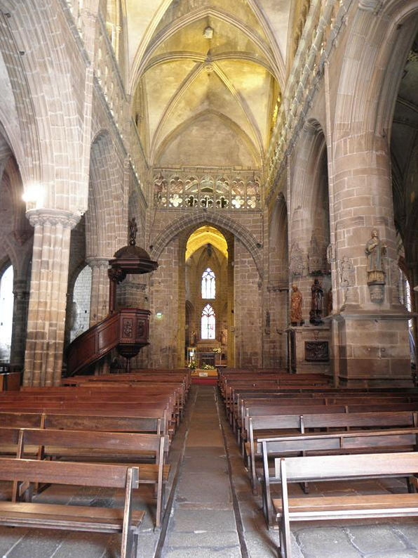 Intérieur de la basilique Notre-Dame de Bon-Secours de Guingamp (22). .